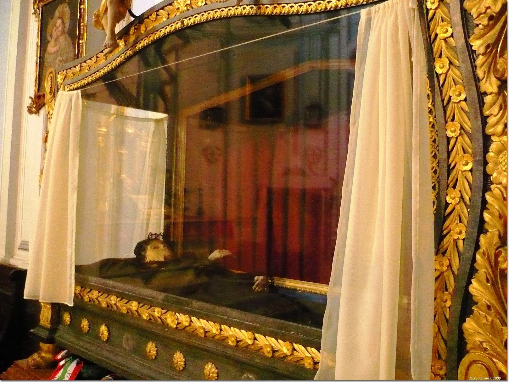 Krásna Hôrka